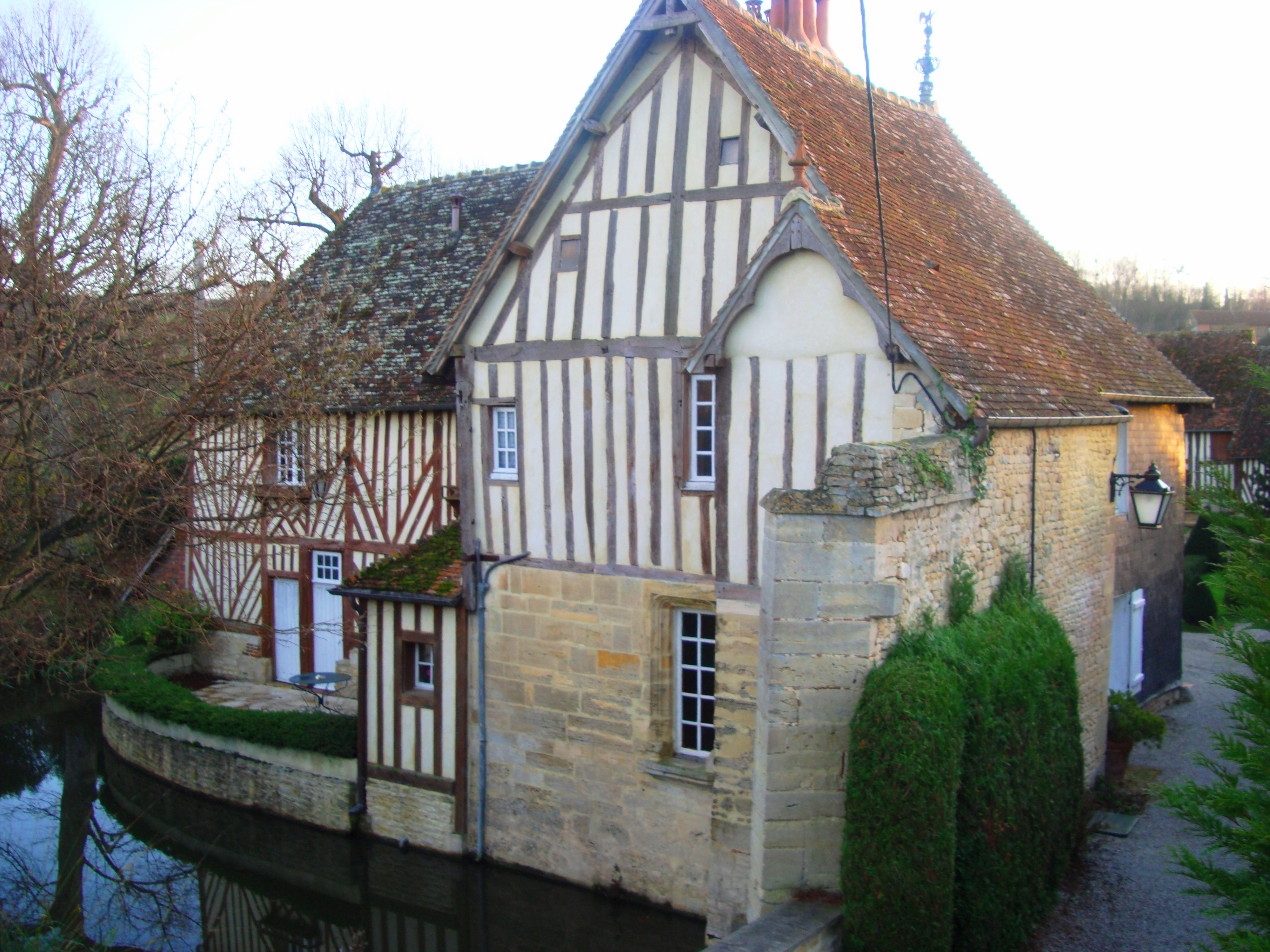 Manoir de Boissey, Calvados